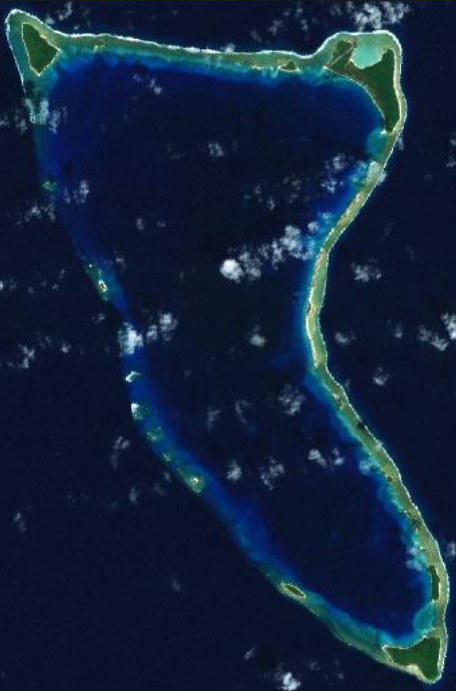 Atoll de Wotho aux îles Marshall.